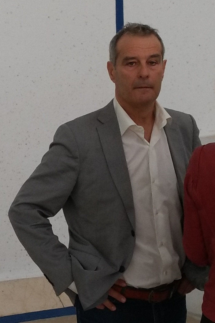 Fredi, al dau de Pelayo, abans del començament de la final del XXXI Individual d'Escala i Corda.